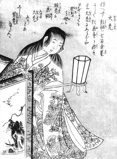 Ōkaburo (大禿) from the Konjaku Gazu Zoku Hyakki (今昔画図続百鬼)